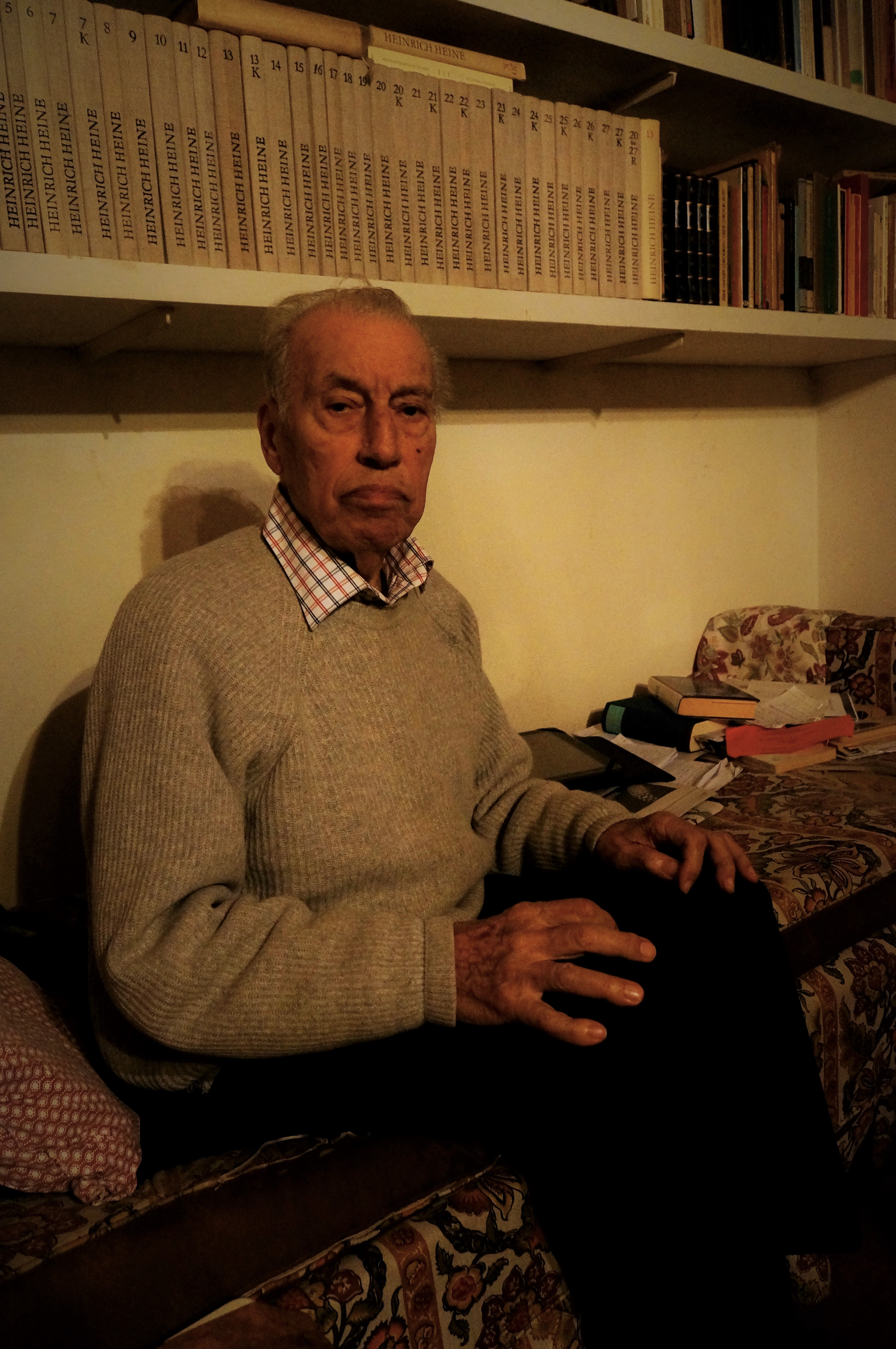 Cercina dicembre 2015